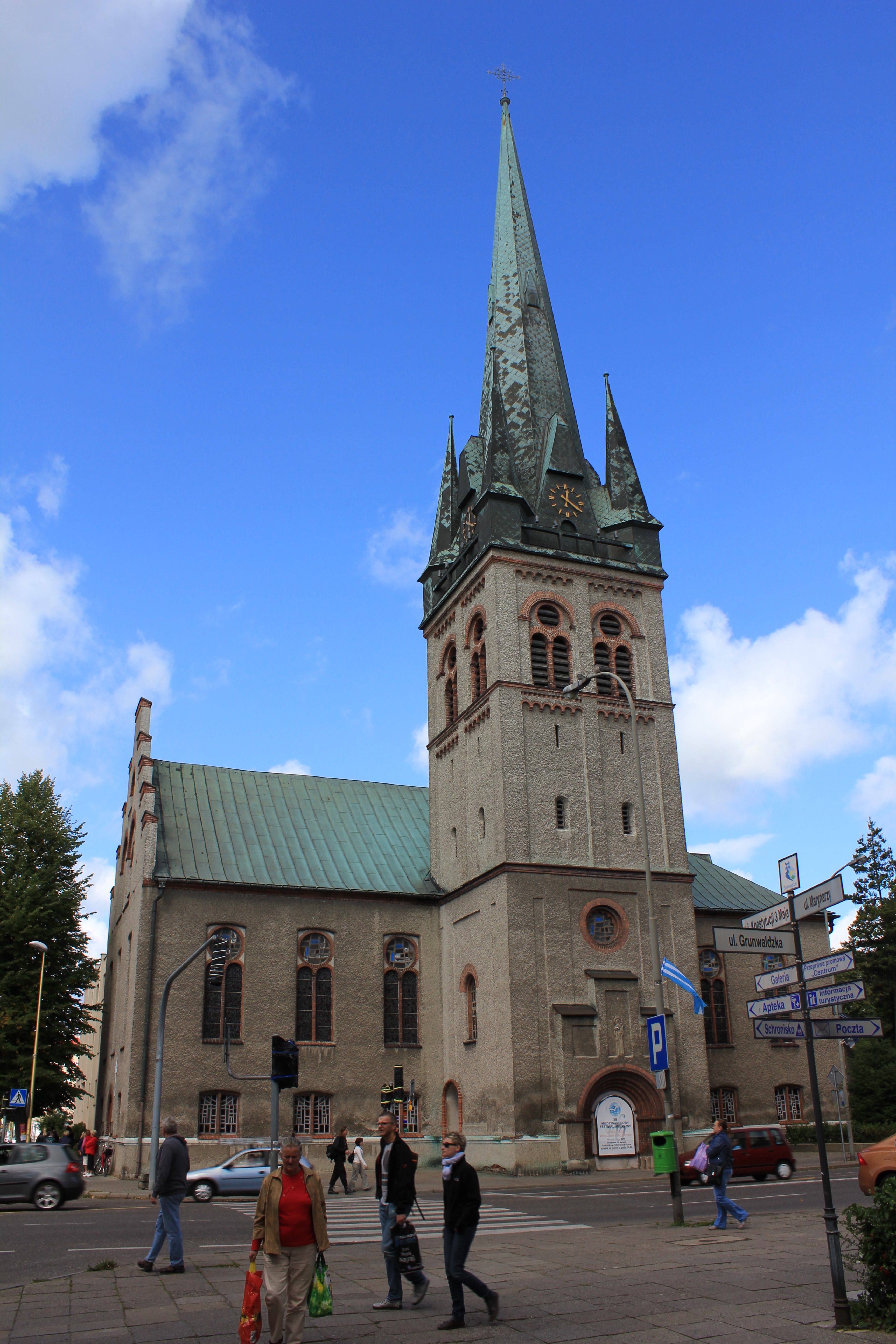 kościół ewang., ob. rzym.-kat. par. p.w. Chrystusa Króla Świnoujście